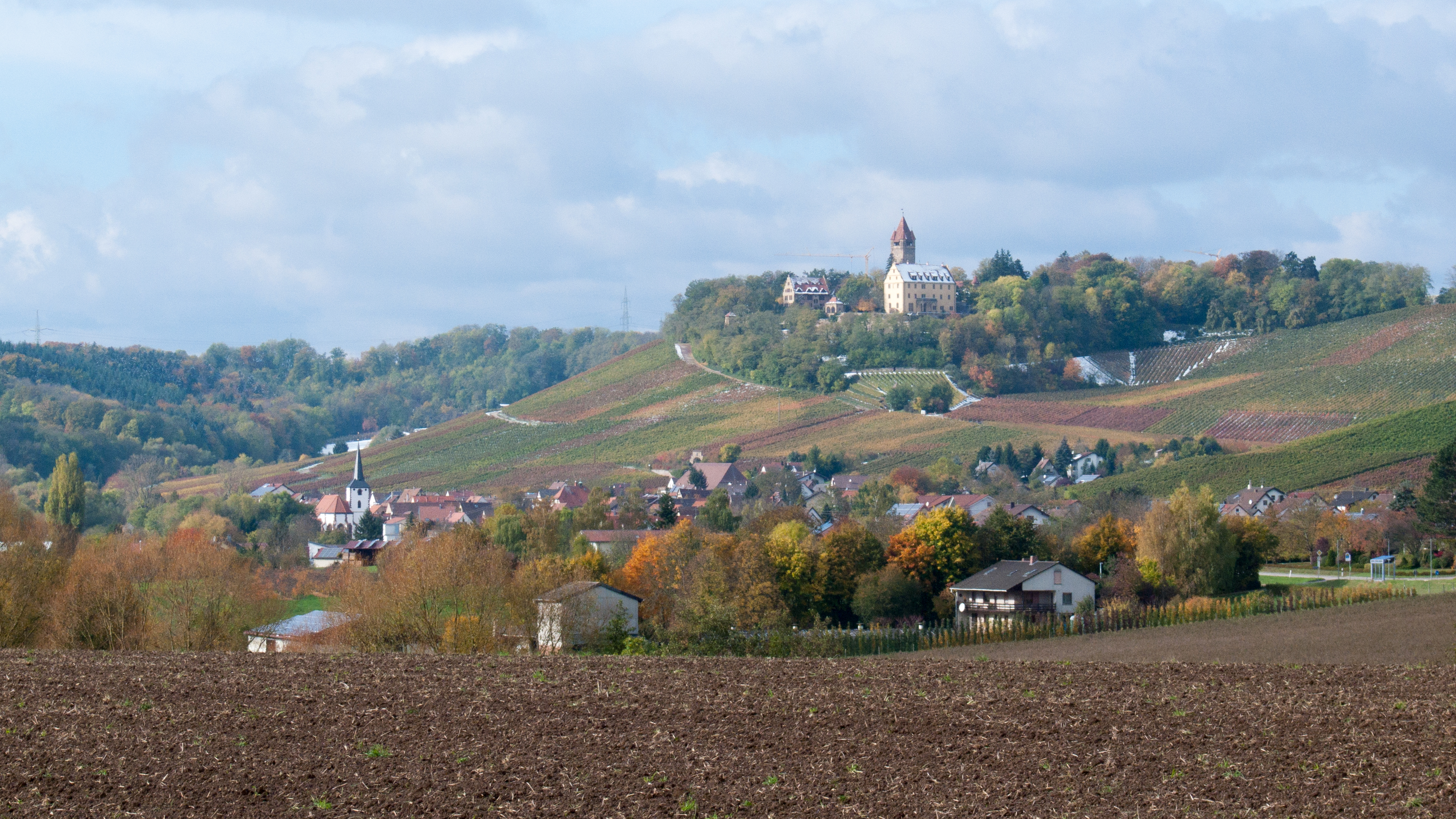 Blick auf den Brackenheimer Teilort Stockheim von Südosten. Deutlich erkennbar ist die prominente Lage von Schloss Stocksberg (rechts oben) über dem Dorf sowie der gotischen Kirche St. Ulrich links in der Talmitte. Auf diesem Bild zeigen zudem die Weinberge rings um das Dorf ihr buntes Herbstkleid, dessen Leuchten von dem an diesem Tag gefallenen Schnee noch verstärkt wird.